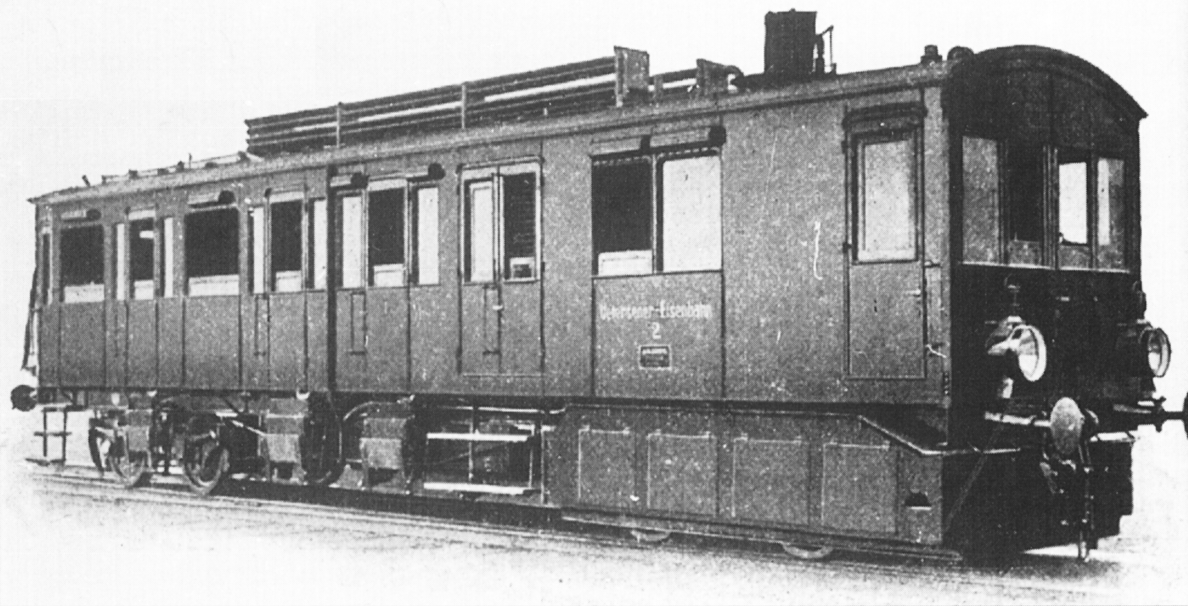 Der zweite Dampftriebwagen (UeE 2) der Uetersener Eisenbahn aus dem Jahr 1908, der Triebwagen wurde von der Maschinenfabrik Borsig/Berlin gebaut.